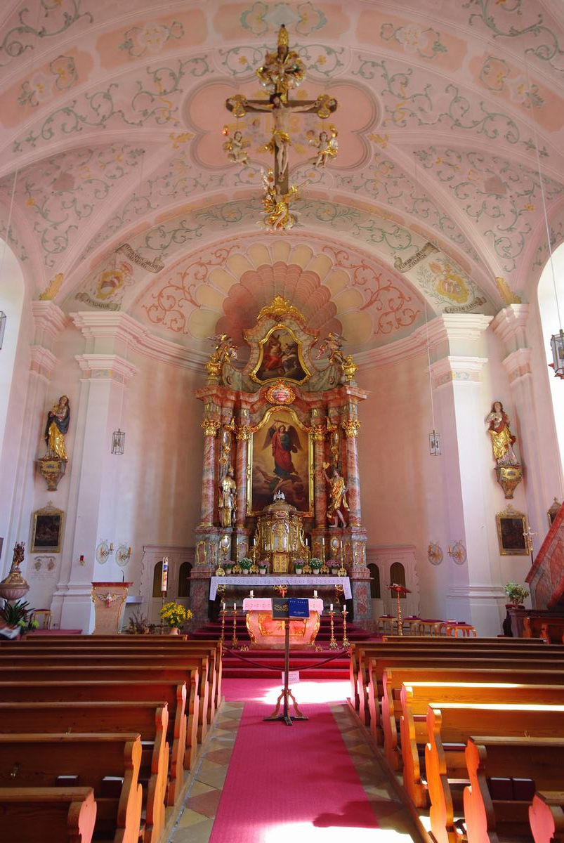 Rathausplatz 2, 83334 Inzell Katholische Pfarrkirche St. Michael Genehmigung für Innenaufnahmen durch Erzbischöfliches Ordinariat München, Ressort Bauwesen und Kunst vom 21.08.2012 liegt schriftlich vor.This is a photograph of an architectural monument.